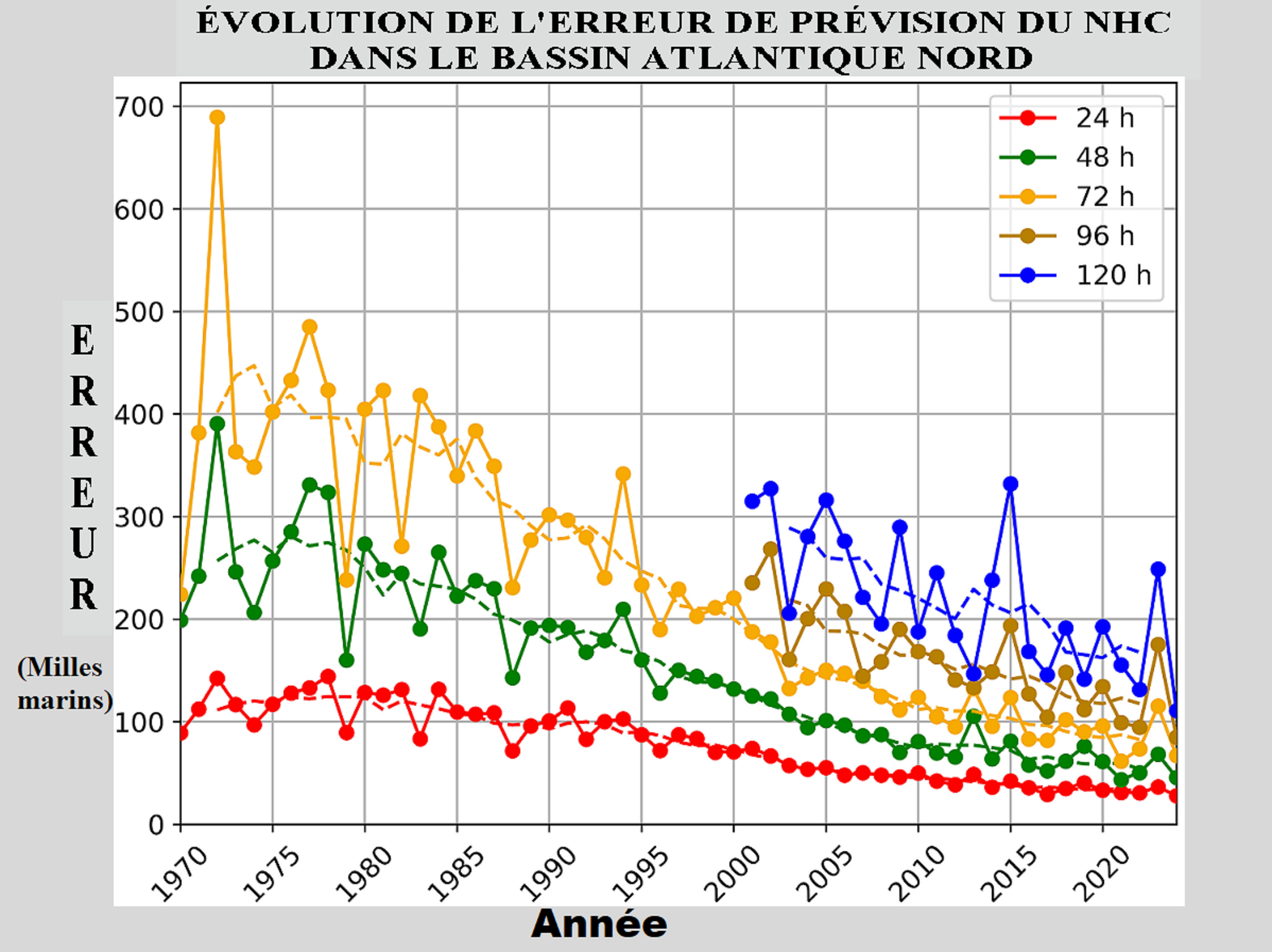 Tendence de l'erreur de prévision de la trajectoire des ouragans du National Hurricane Center depuis 1970. On voit l'amélioration depuis ce temps. L'erreur est en milles marins. les différentes courbes représentent l'erreur à différents temps de prévisions (ex. 36h veut dire la prévision qui a été faite il y a 36 heures du temps de vérification).